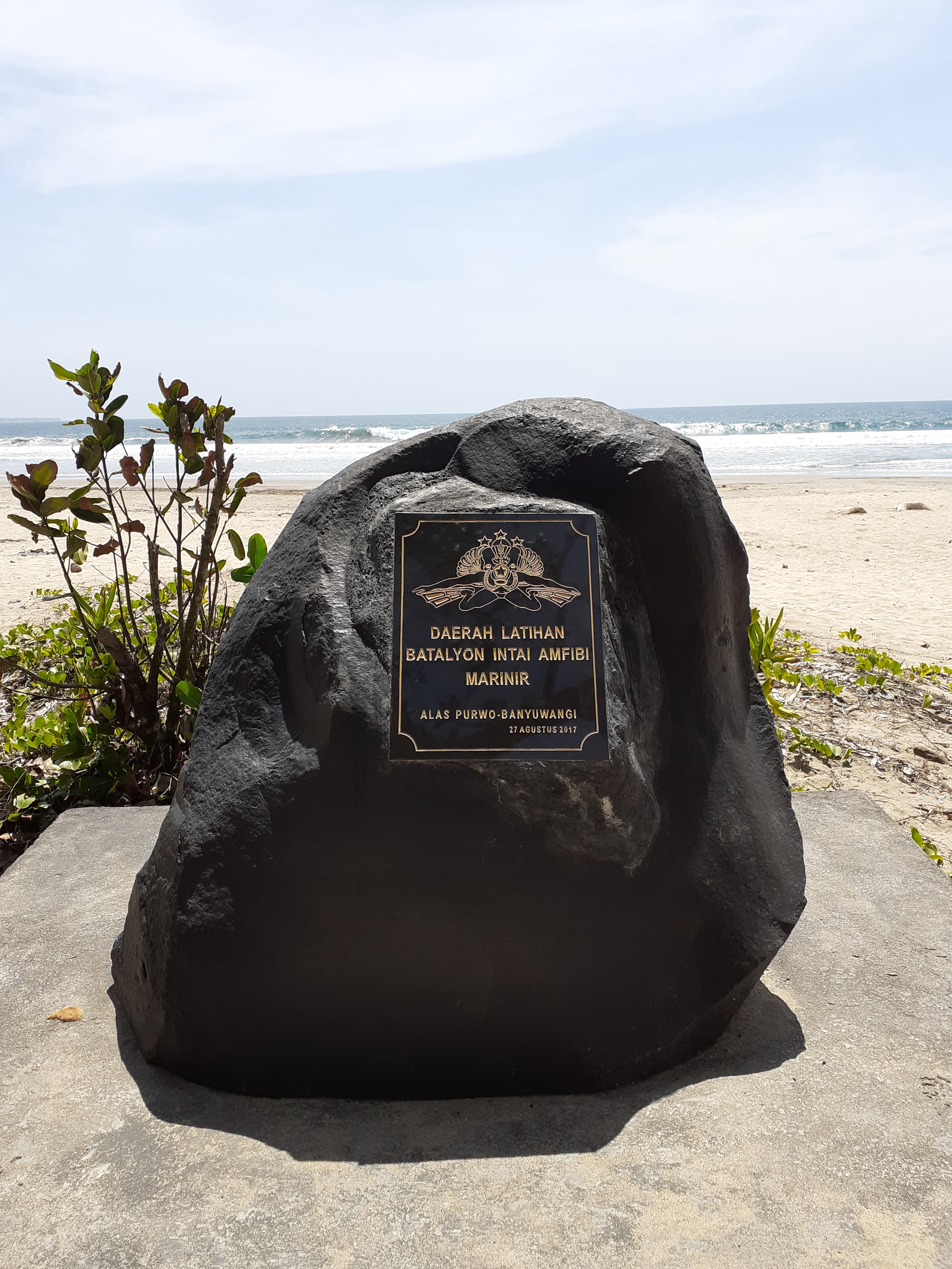 Patok penanda daerah latihan Yon Taifib di Pantai Trianggulasi, Banyuwangi